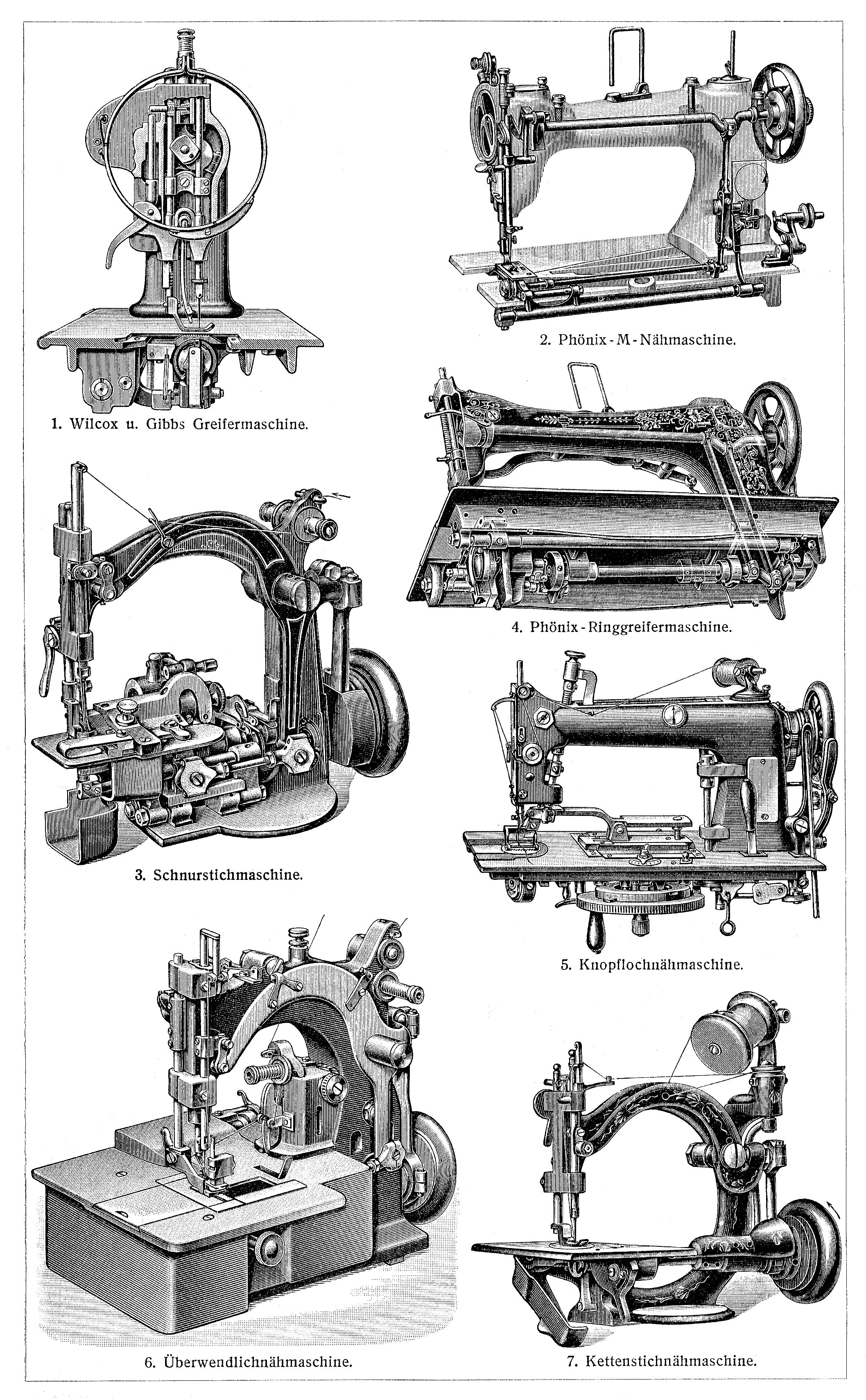 Verschiedenen Nähmaschinenmodelle, Tafel 2 (Beschreibung siehe Artikel)